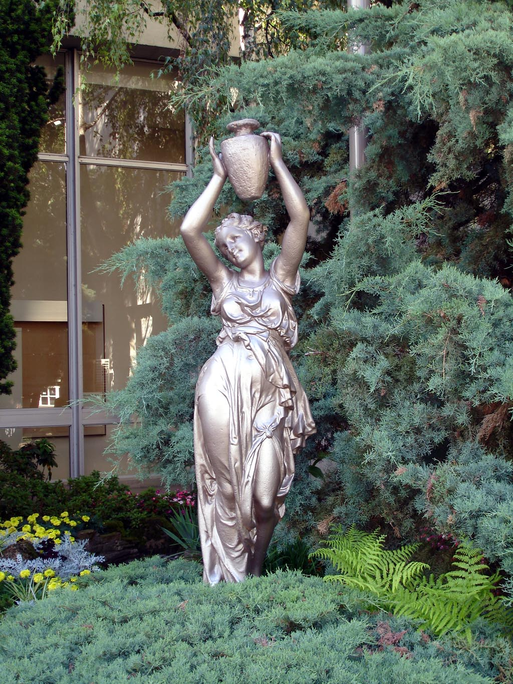 La statue de Rébecca à Franconville (Val-d'Oise), France Créée vers 1868, cette statue en fonte peinte surmontait une fontaine en pierre au milieu d'un carrefour circulaire. Elle a été depuis érigé à côté de l'entrée du nouvel hôtel de ville. Juillet 2007 Photo personnelle (own work) de Clicsouris